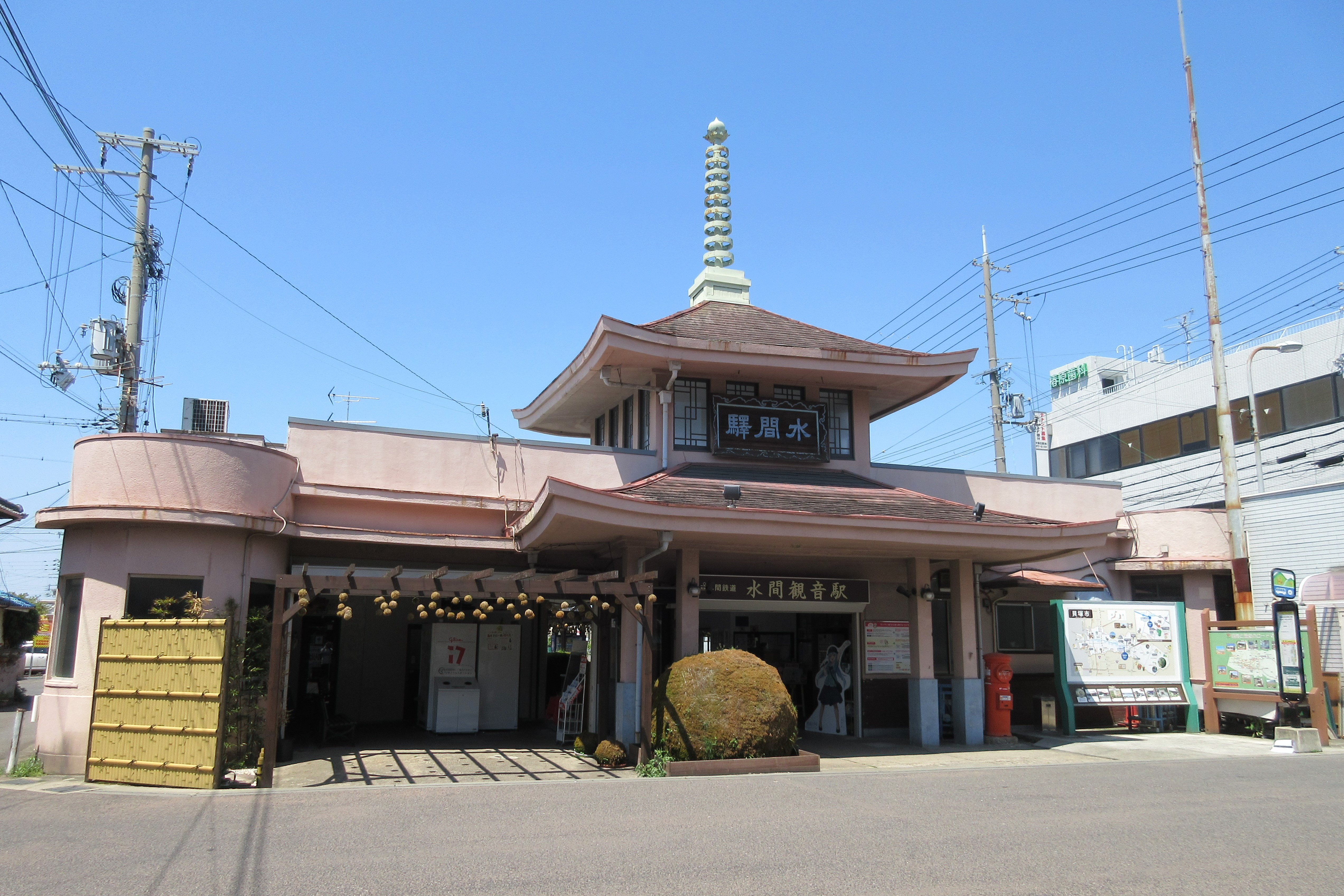 水間鉄道水間観音駅